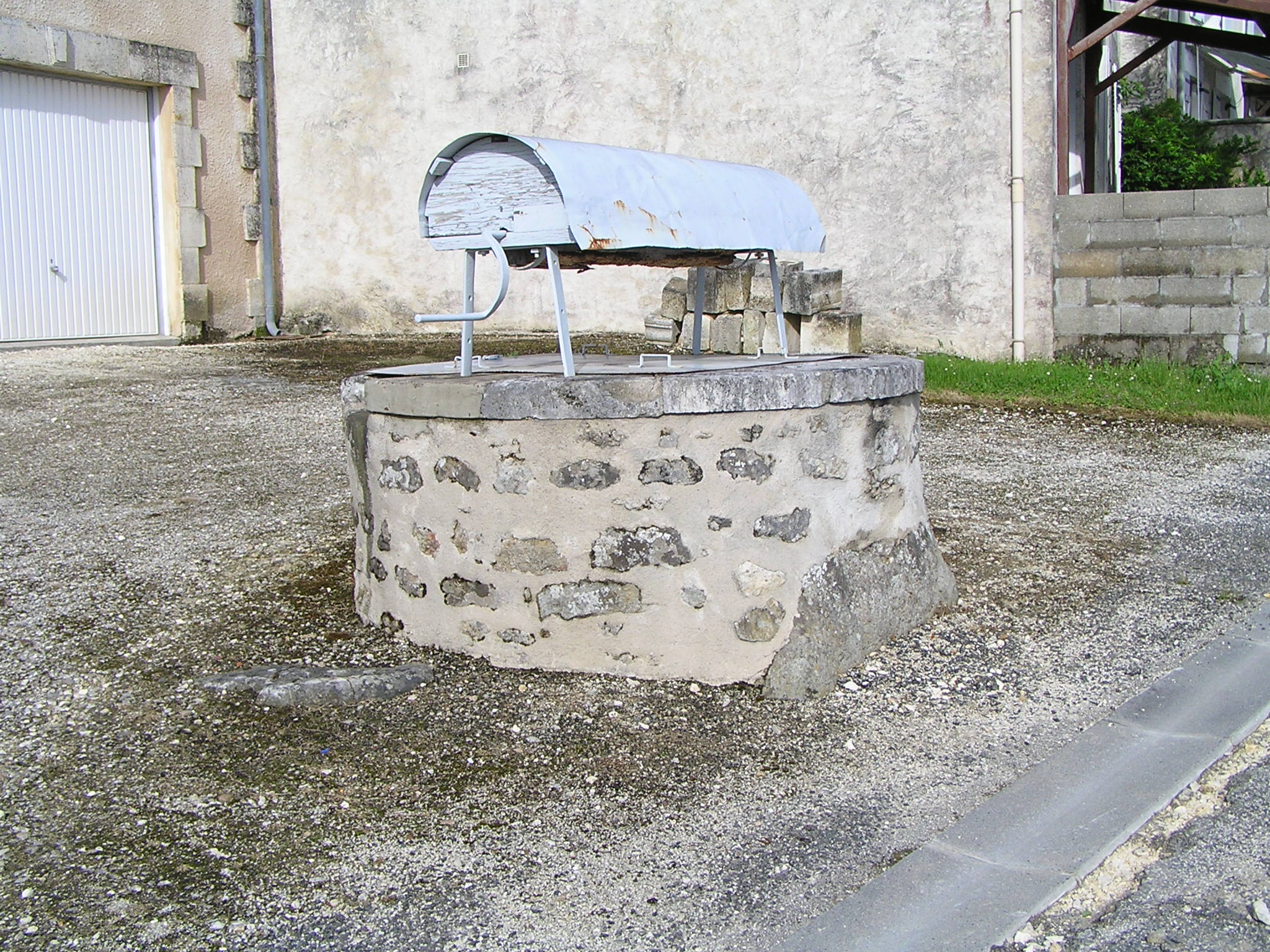 puits à Chillac